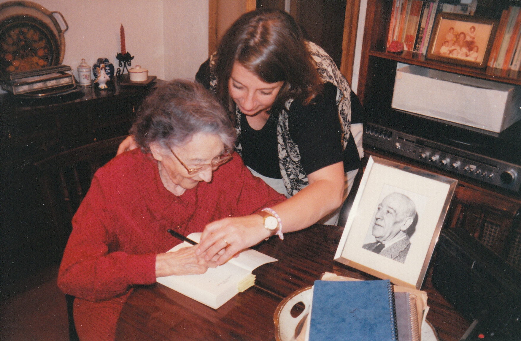 Ernestina de Champourcin y Edith Checa. La periodista y escritora Edith Checa entrevistó a Ernestina de Champourcin dos años y medio antes de su muerte. Sobre la mesa, la foto de su esposo, Juan José Domenchina.